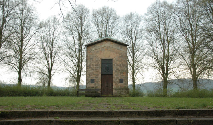 Das 1932 eingeweihte Carl-Gustav-Rommenhöller-Denkmal am südlichen Ortsrand von Herste, Zum Sprudelfeld, Bad Driburg, Deutschland.